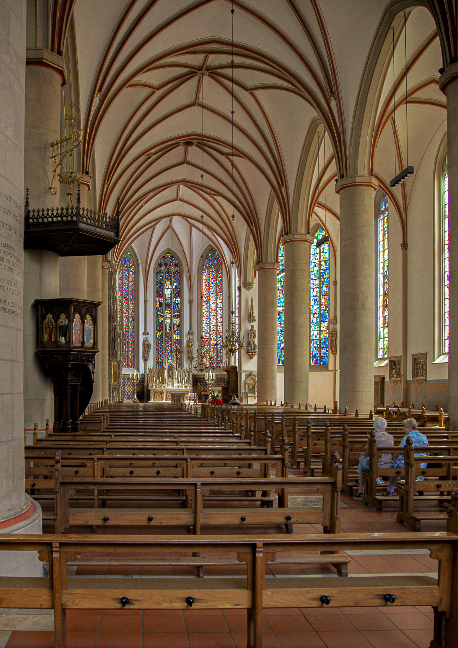 Lüdinghausen, St. Felicitas, Hauptschiff mit Kanzel